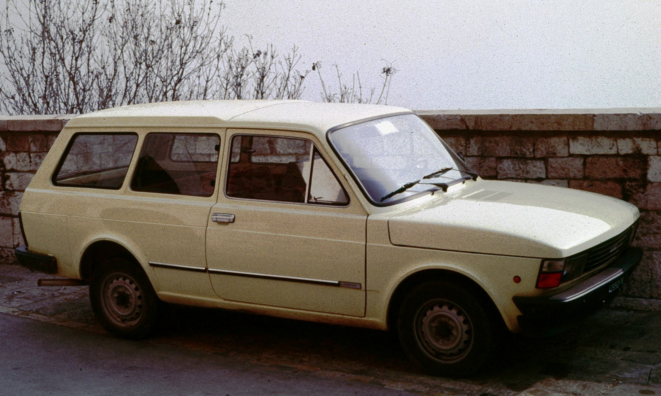 Fiat 147 Break / Panorama in Assisi.